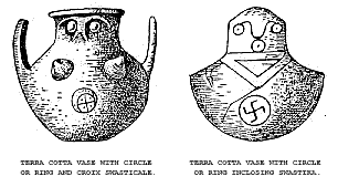 Two owl like vases from Ilios; one has swastika type symbol.